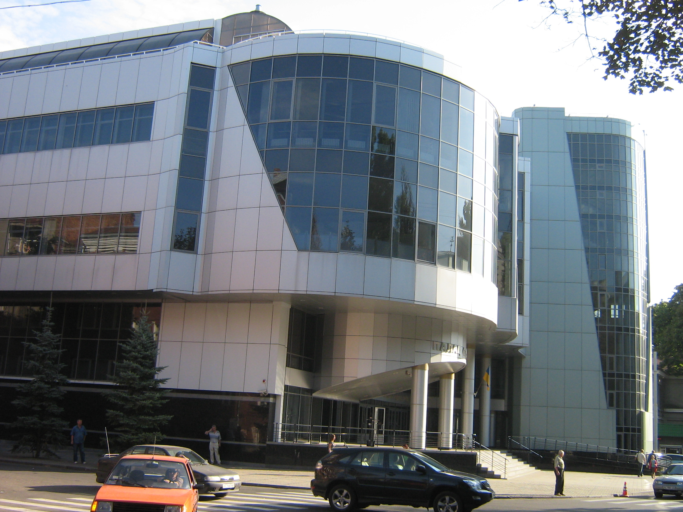 Дворец студентов Национального юридического университета Украины им. Ярослава Мудрого. Харьков,ул. Пушкинская.